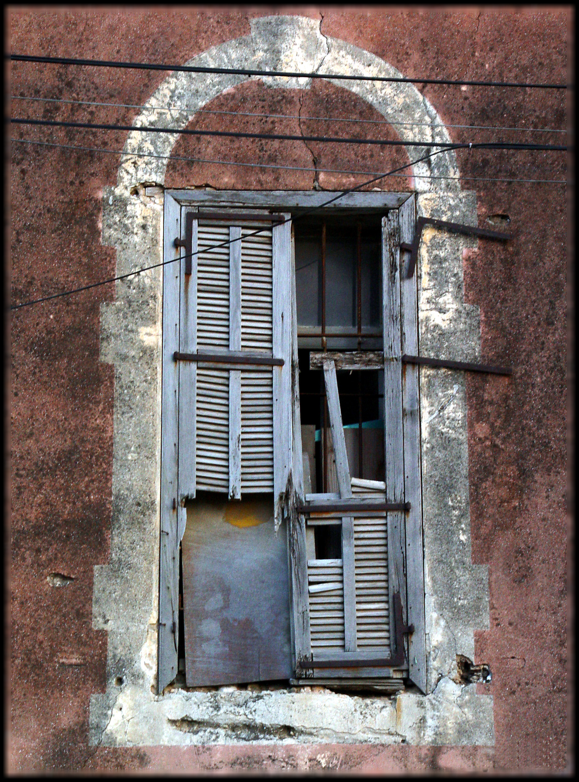 חלון ישן בנווה צדק, תל אביב, על ידי --גיא חיימוביץ 05:22, 11 מרץ 2006 (UTC)